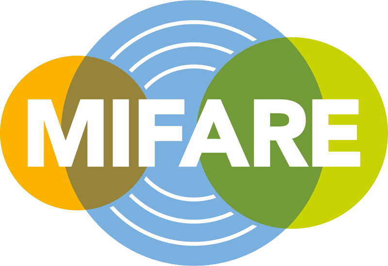 恩智浦半导体公司（NXP Semiconductors）在非接触式智慧卡及近场感应卡领域的注册商标。